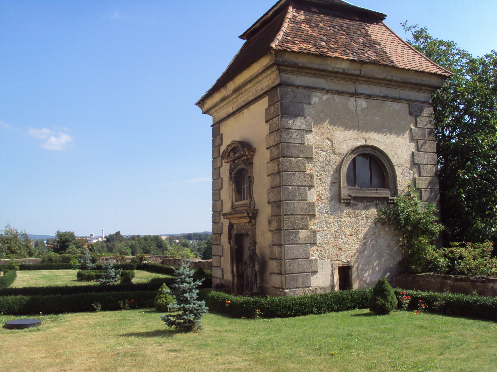 Umrlčí kaple v sousedství mimoňského kostela